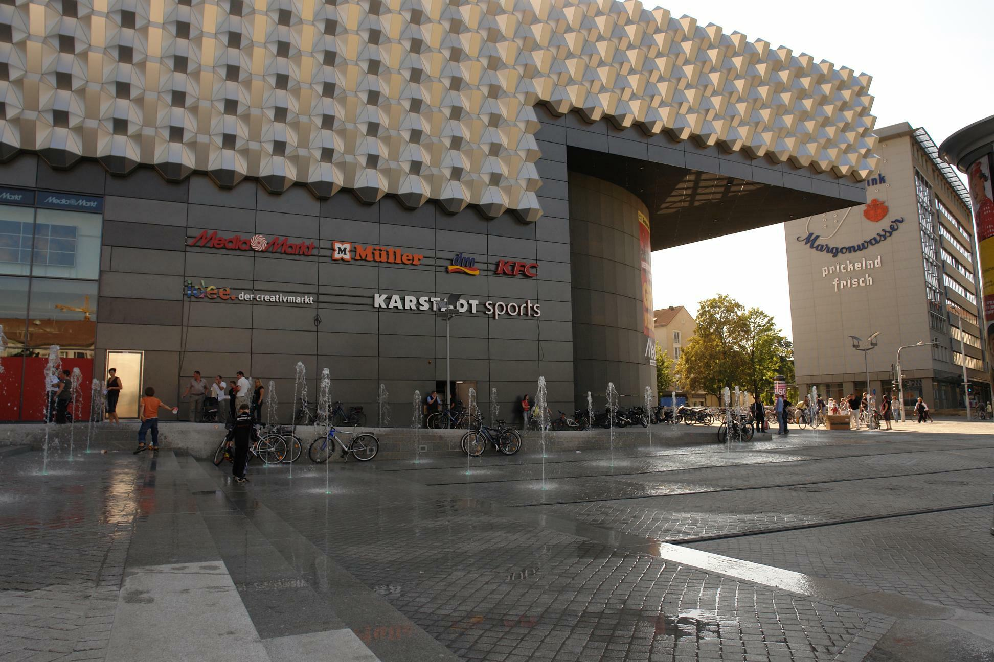 Centrum-Galerie am Dippoldiswalder Platz in Dresden mit Blick auf das „Margon-Haus“